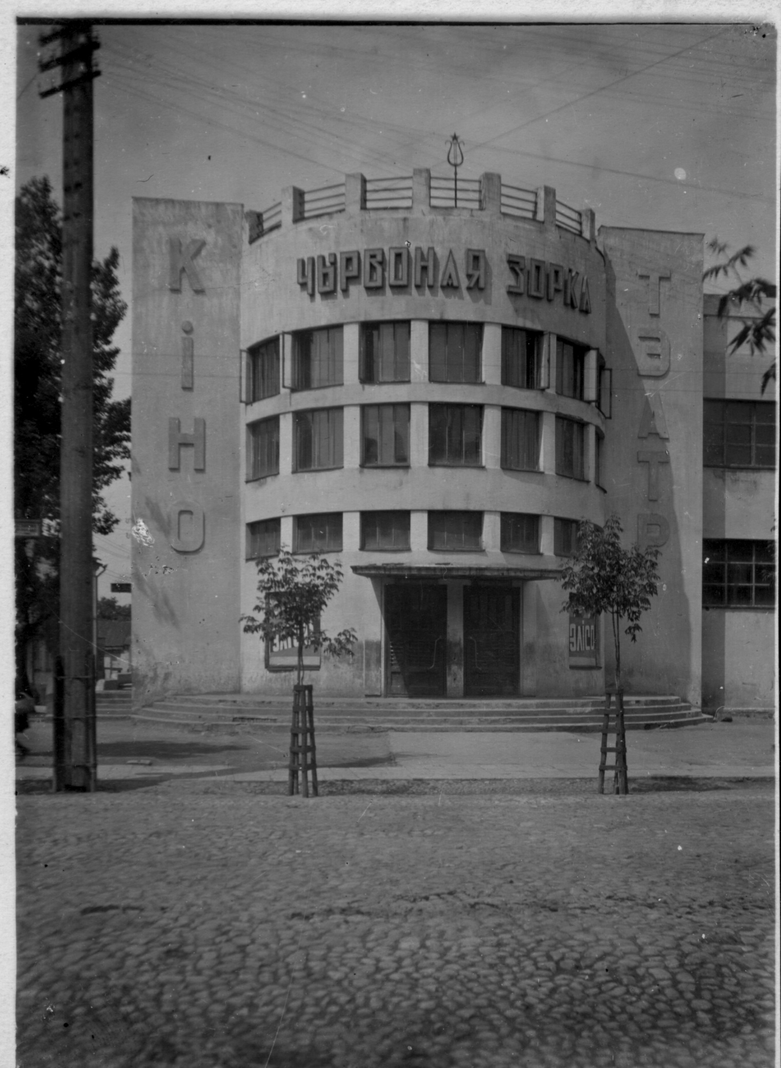 Беларуская (тарашкевіца): Магілёў (Mahiloŭ), вуліца Шклоўская (vulica Škłoŭskaja). Кінатэатар Чырвоная Зорка (Čyrvonaja Zorka)